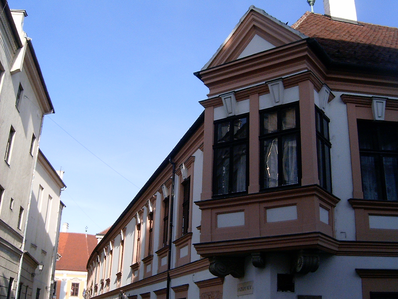 A Curia Nobilitaris Győrött (Győr-Moson-Sopron megye)